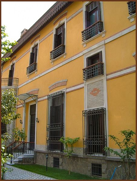 Levantine built Loehner Mansion in Karşıyaka, İzmir, Turkey